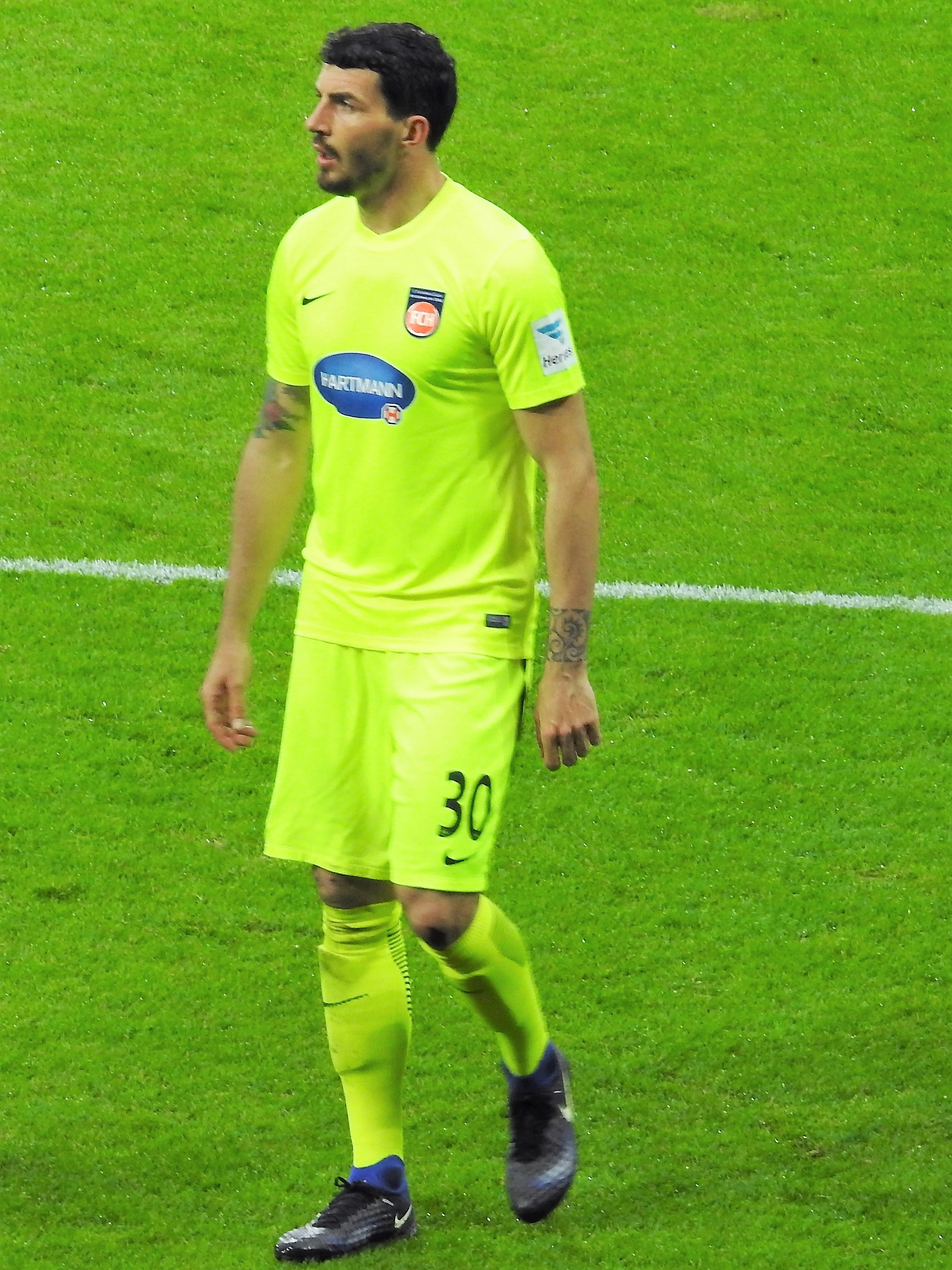 Norman Theuerkauf 2017